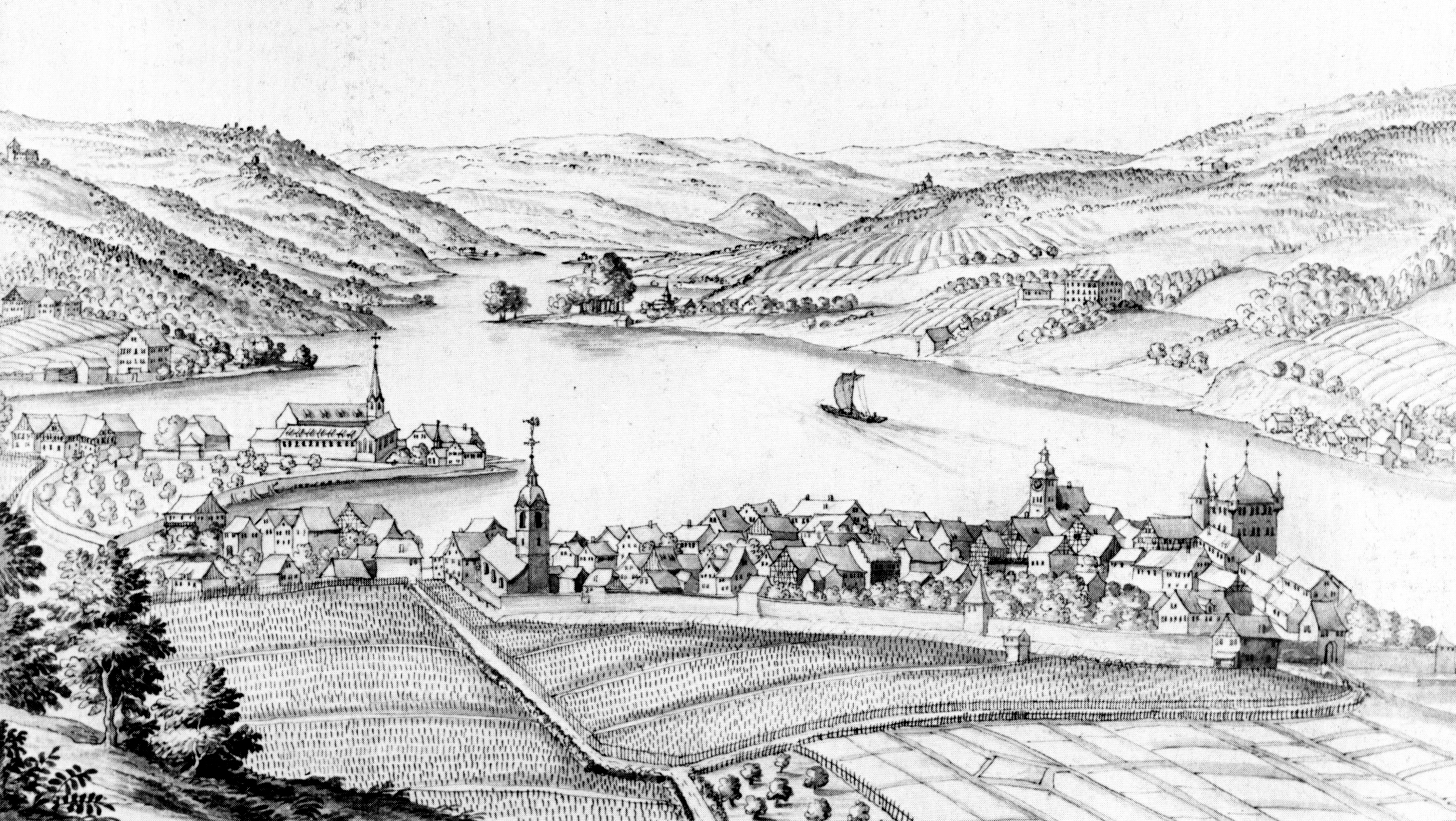 Steckborn mit dem Kloster Feldbach. Lavierte Federzeichnung, 1. H. 18. jh. Zentralbibliothek Zürich